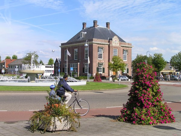 Beursplein, Hoofddorp. Op de achtergrond het oude polderhuis. Foto augustus 2005.